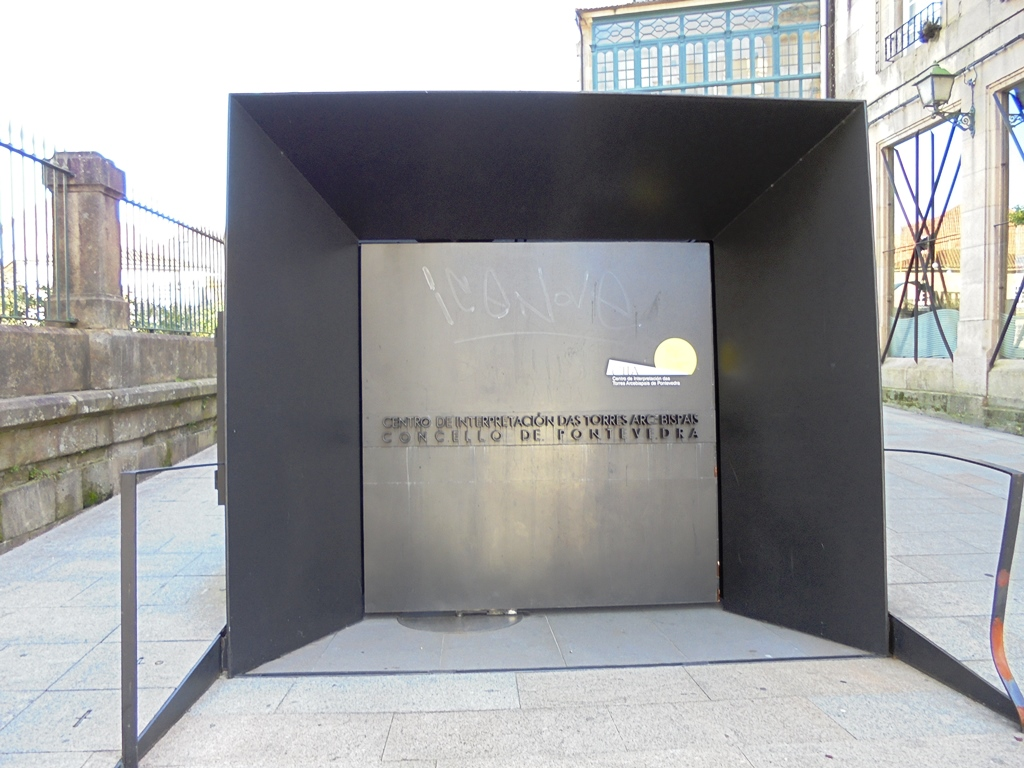 Entrada al Museo CITA en Pontevedra capital